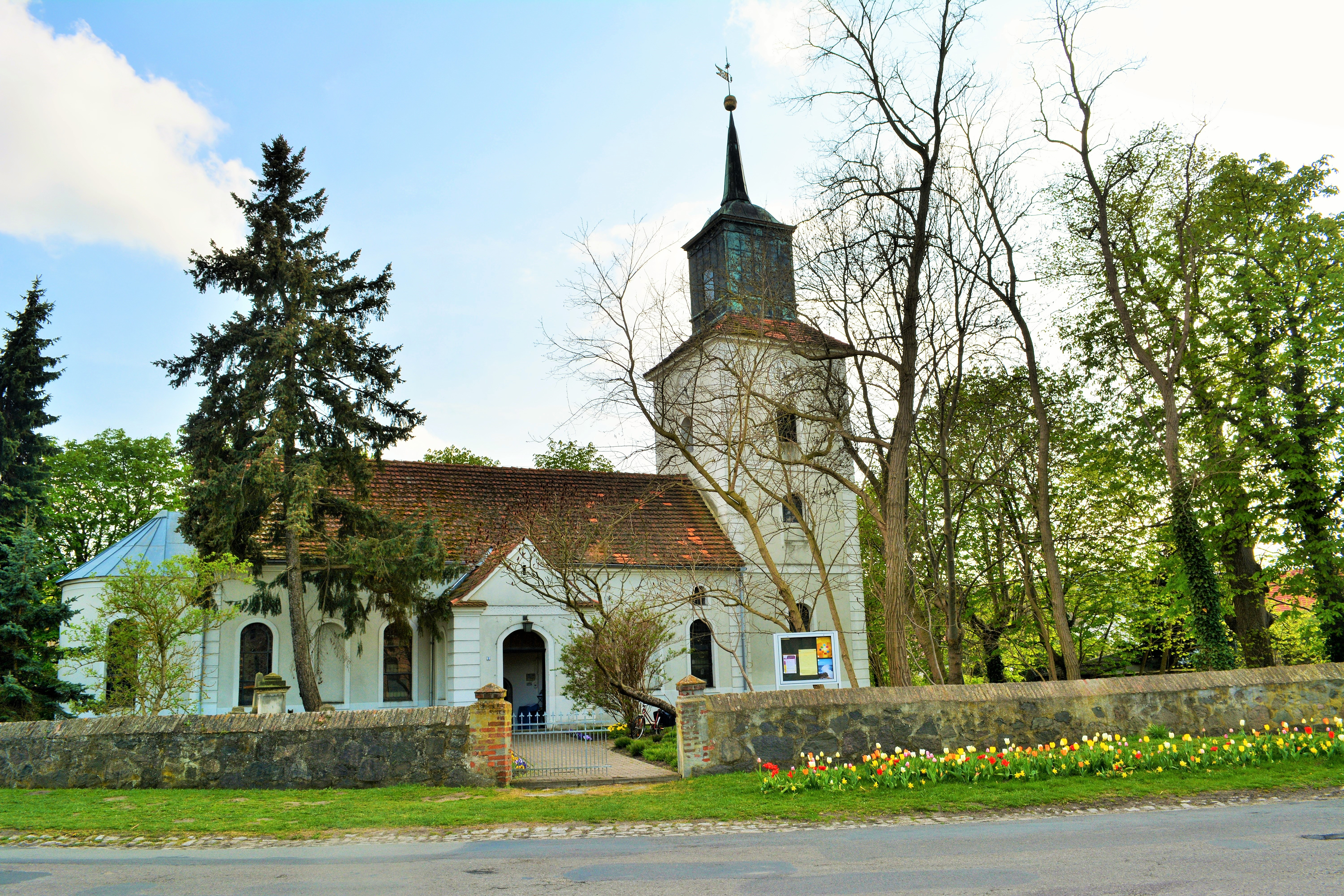 Denkmalgeschützte Dorfkirche in Stölln, Ortsteil der Gemeinde Gollenberg im Havelland, Kirchenschiff von 1824, Turmaufsatz von 1851